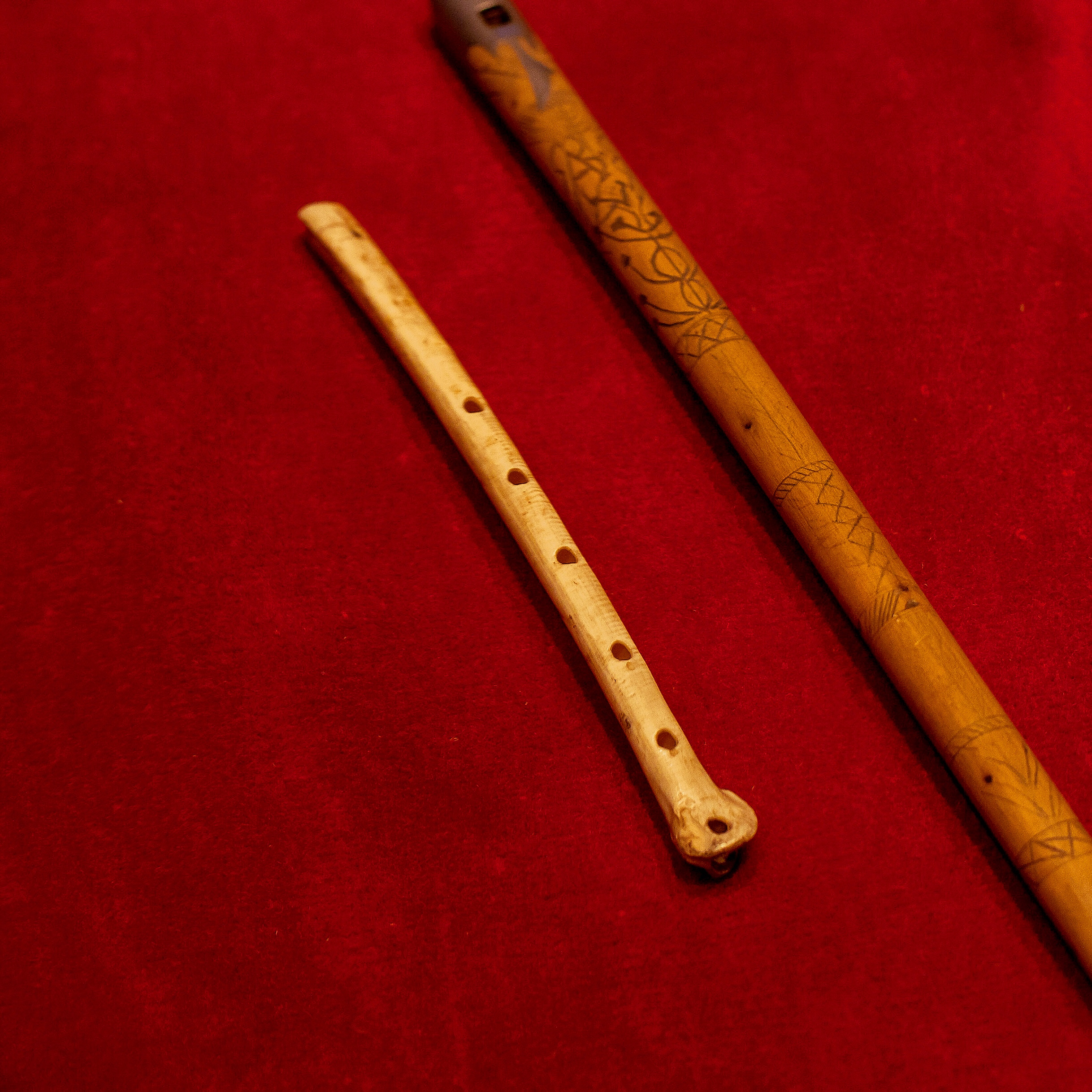 Pinquillo, s. XX, fons del Museu de la Música